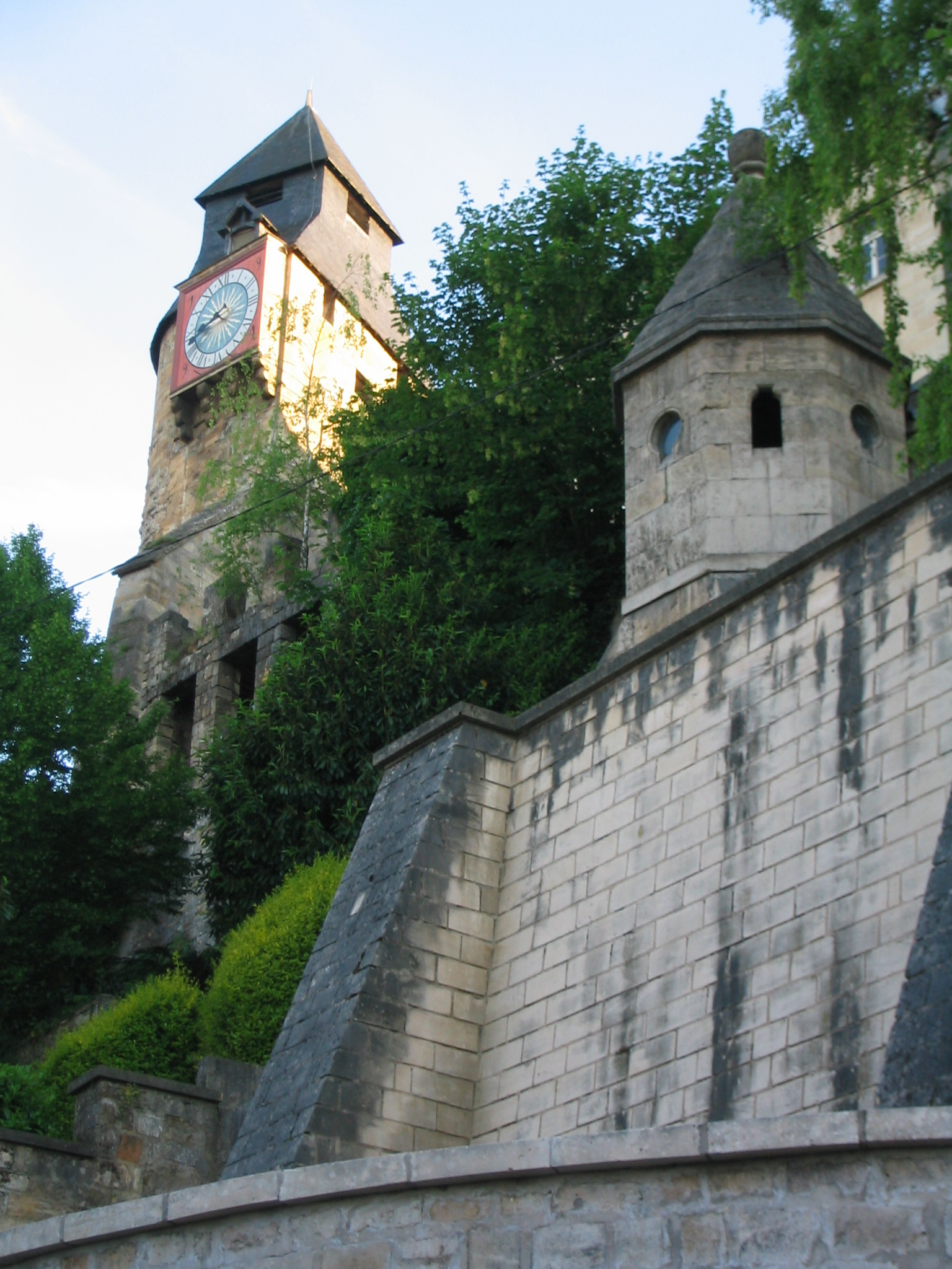 Bar-le-Duc (département Meuse ; région : Lorraine ; France) : La tour de l'Horloge